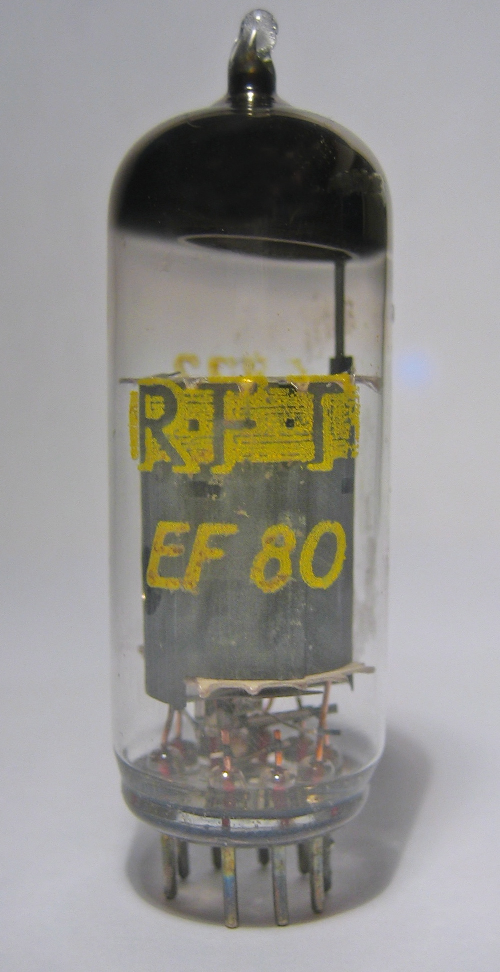 RFT EF80 Vacuum Tube